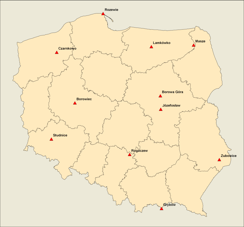 Schemat rozmieszczenia punktów sieci EUREF-POL.